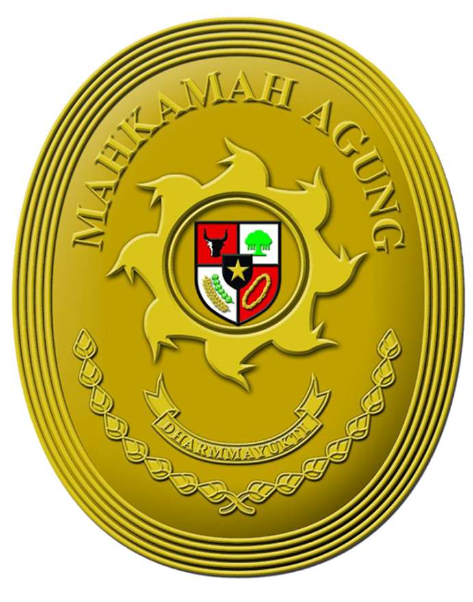 Logo Resmi Mahkamah Agung Republik Indonesia